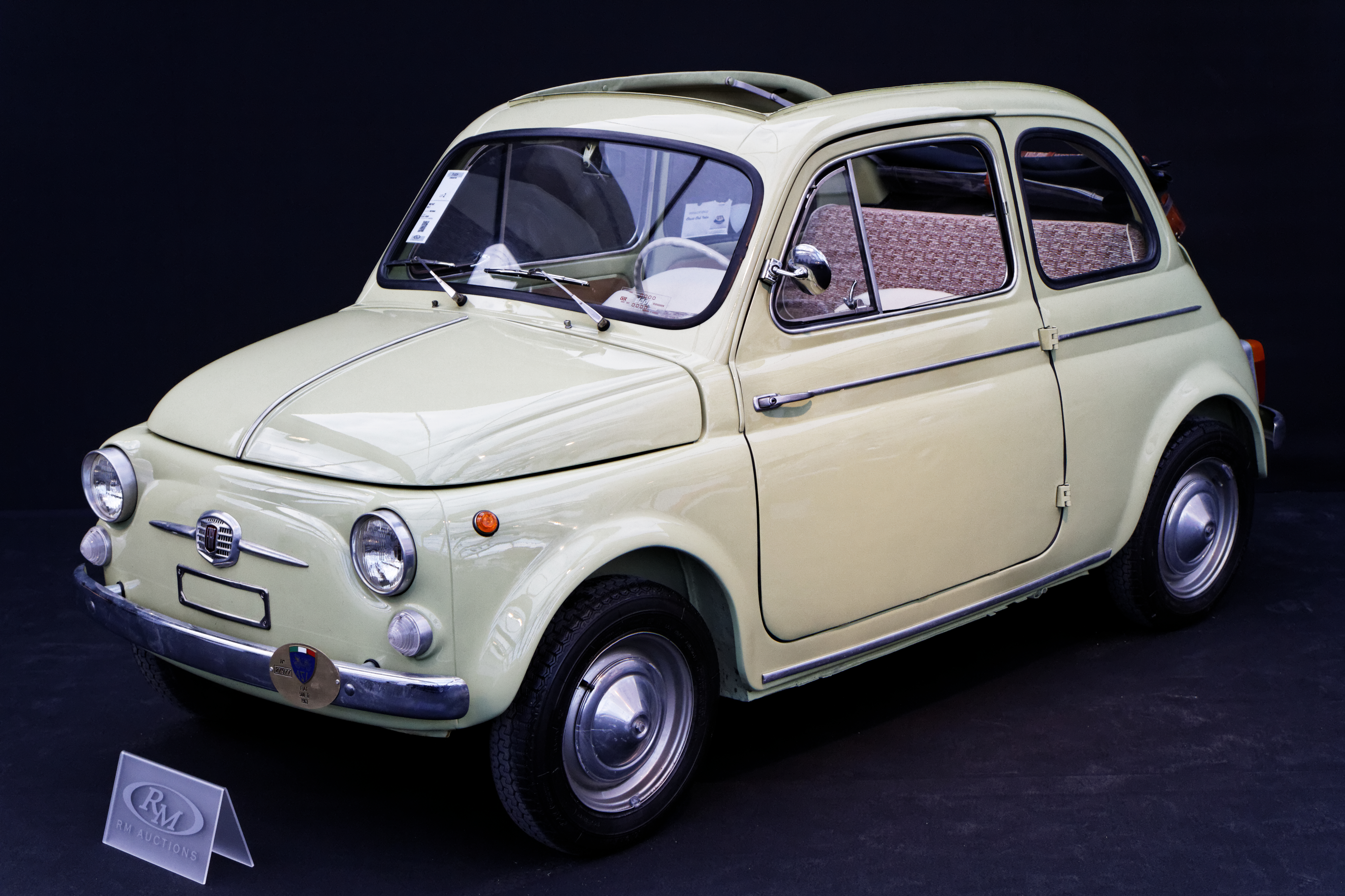 Une Fiat 500 D de 1963.